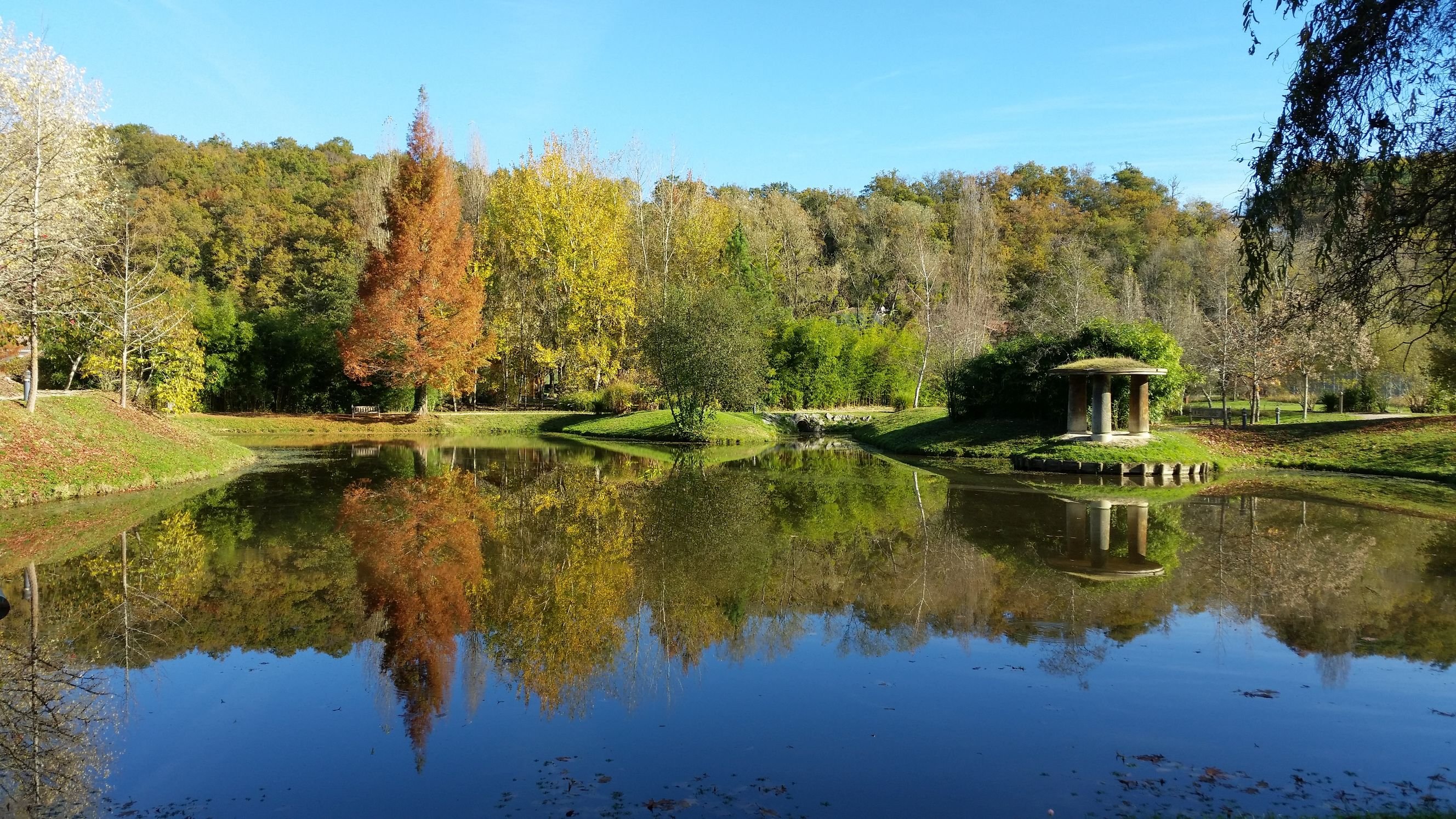 Le petit lac communal derrière les fontaines d'Eugénie-les-Bains